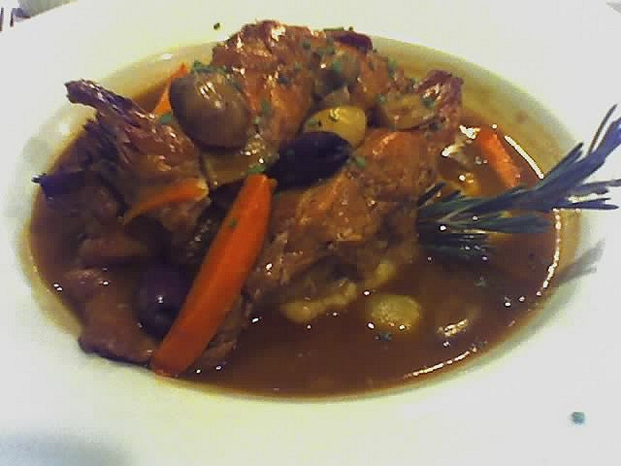 Civet de lapin et ses légumes